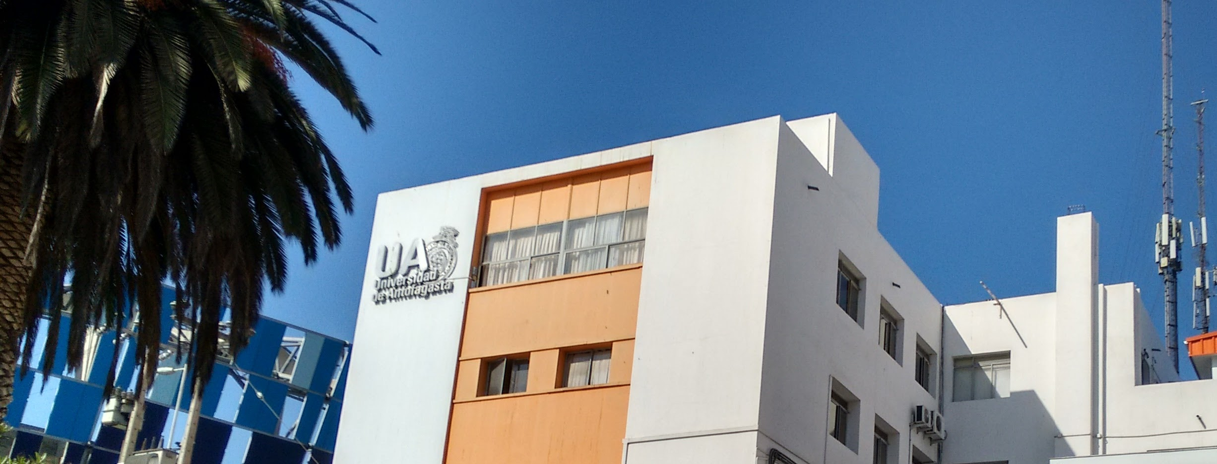 Fachada del campus Angamos, sede administrativa de la universidad. Antofagasta, Chile.